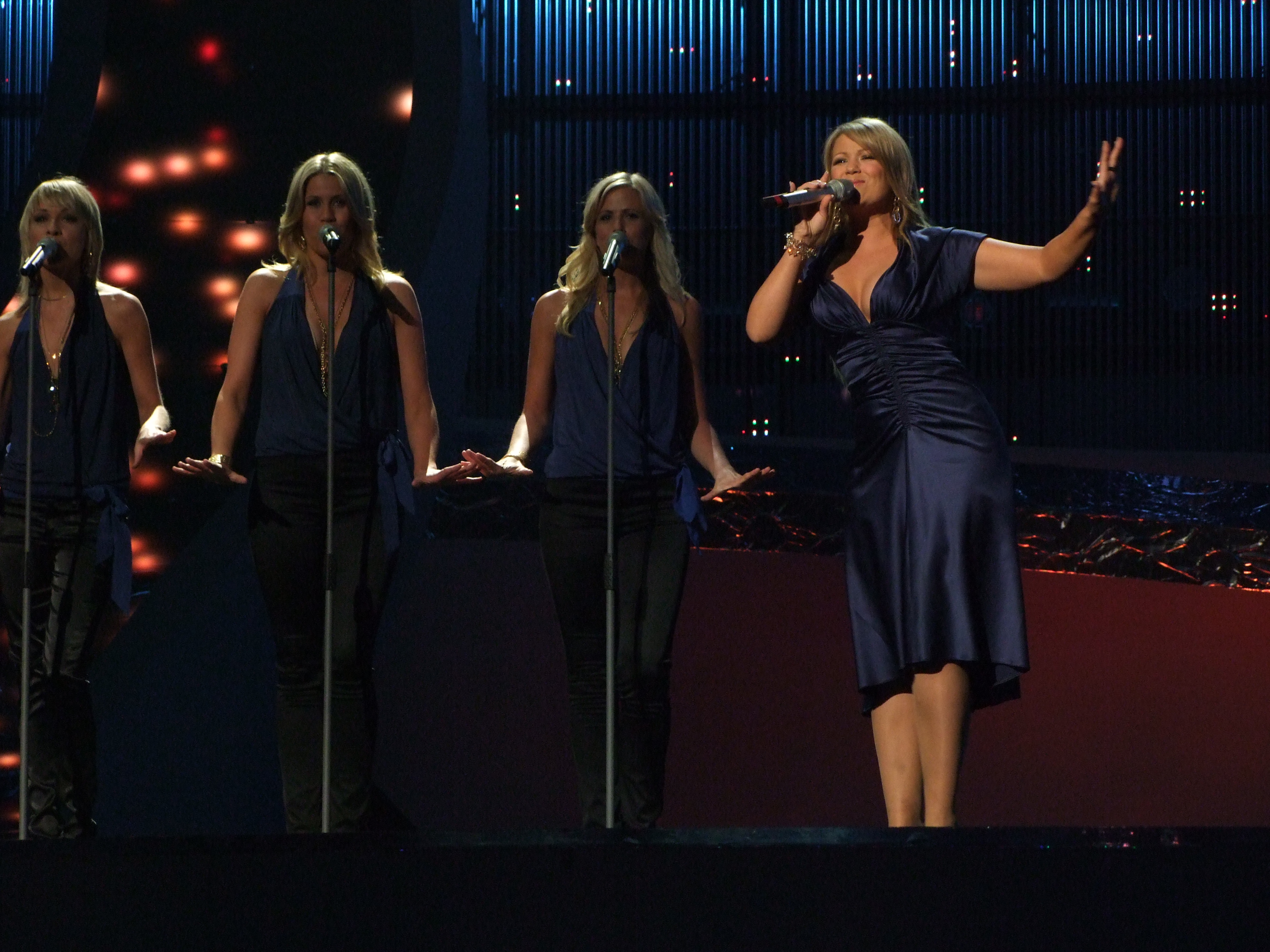 Semifinal 1 EUROVISION 2008